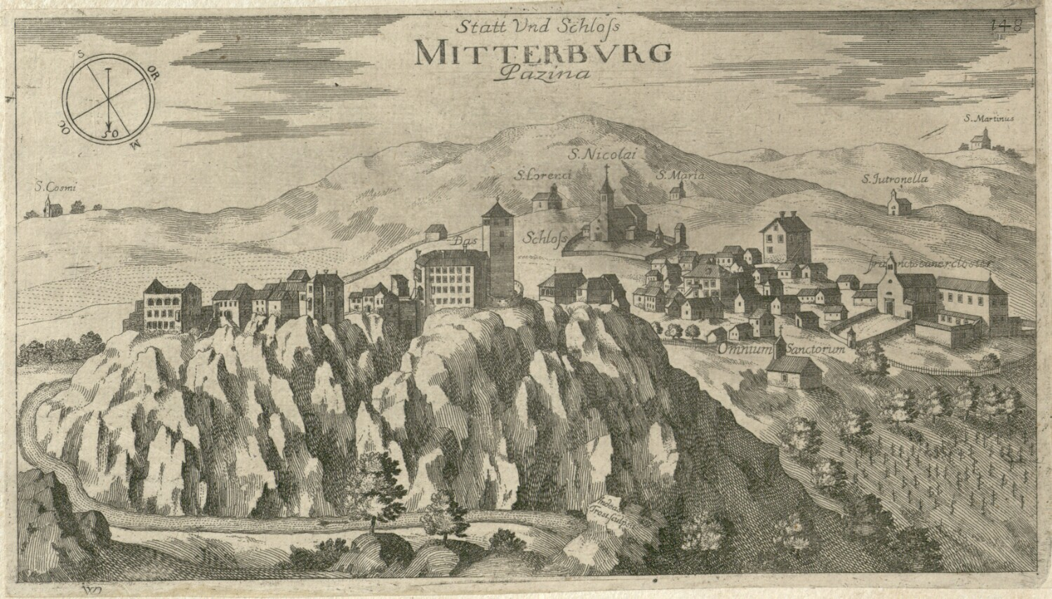 Pazin